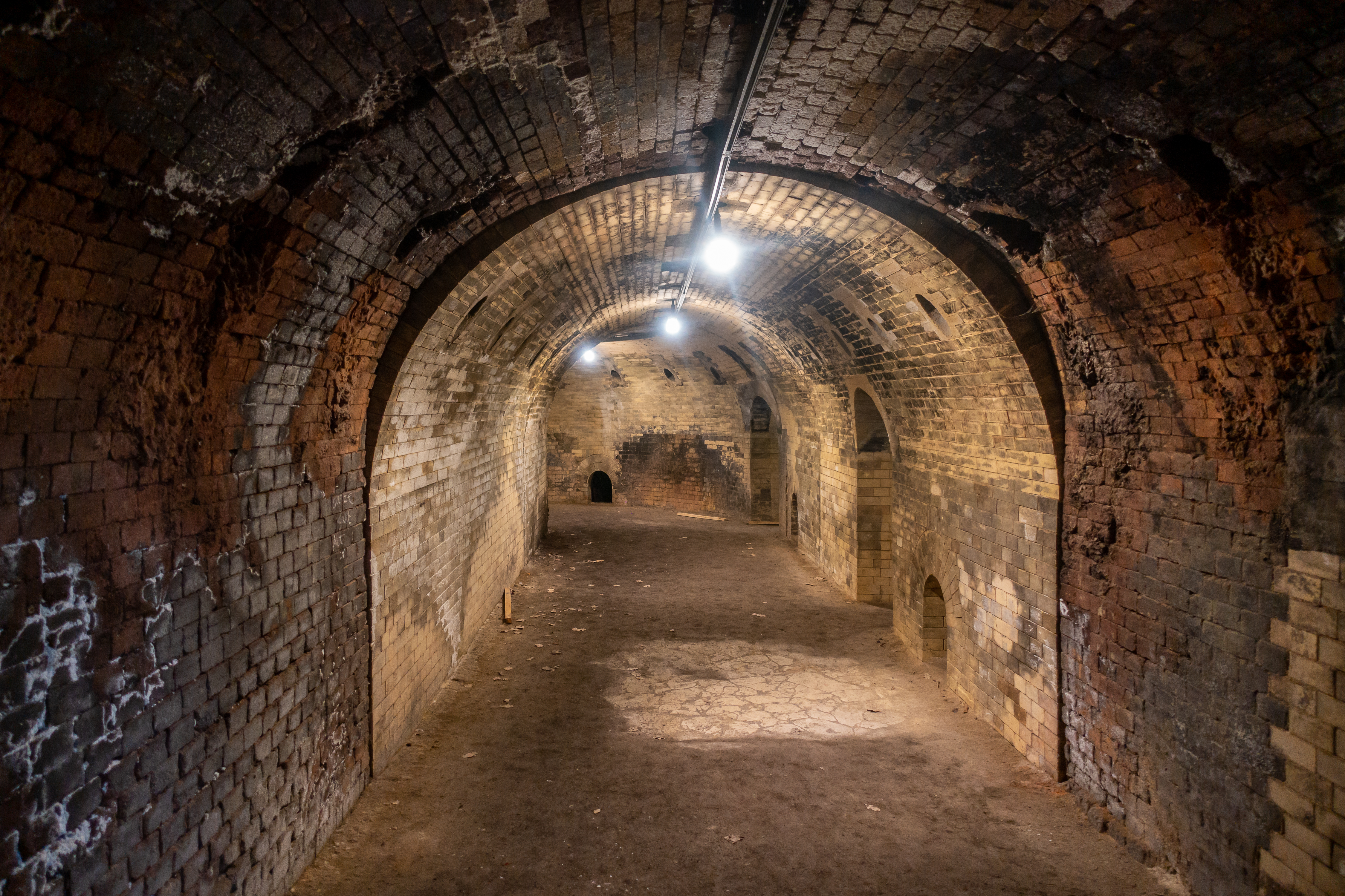 Ehemalige Ziegelei Lage-Sylbach, Ringofen